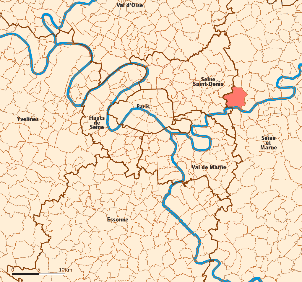 Localisation de la ville de Chelles en Île-de-France